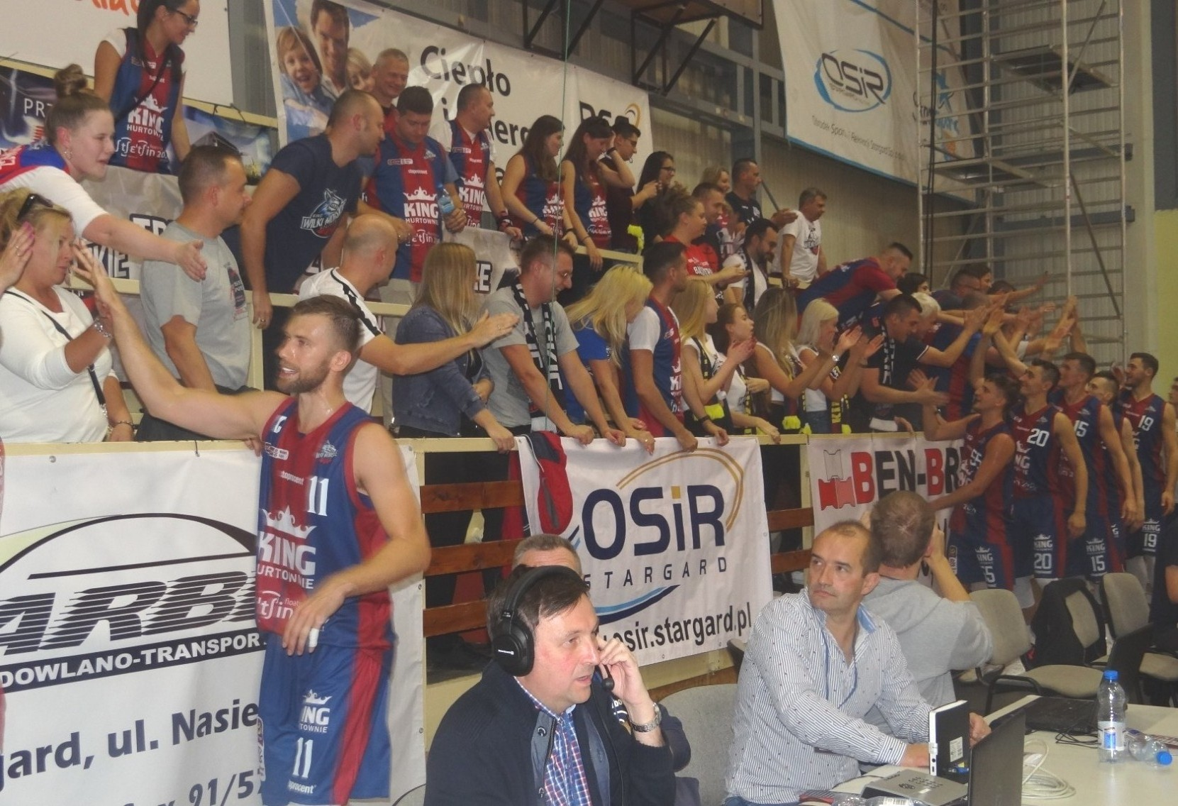 Kibice Kinga Szczecin po meczu ze Spójnią